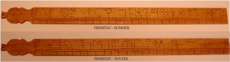 Bastón rúnico Primstav, norwegian